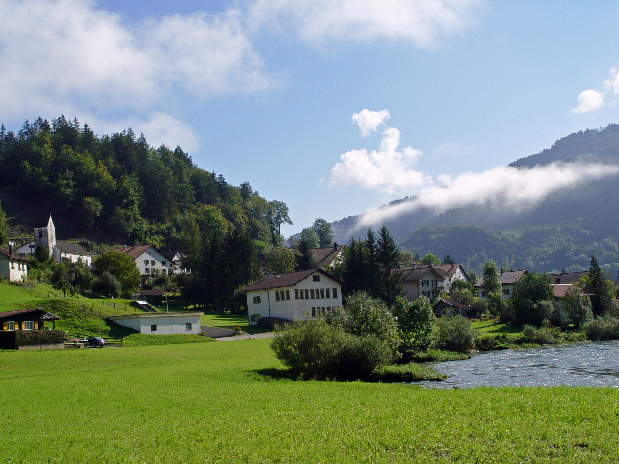 Soubey an Le Doubs im Schweizerischen Jura